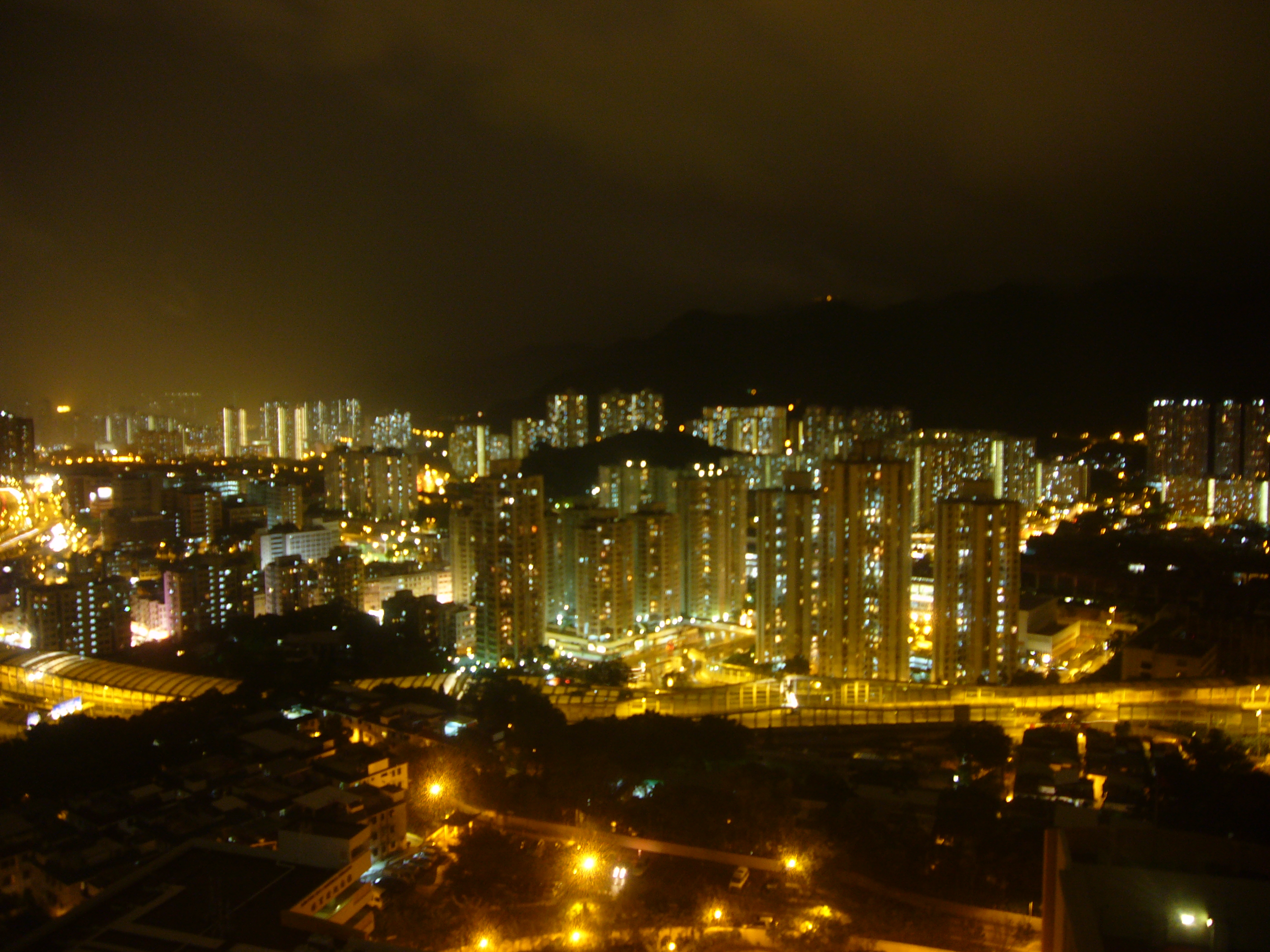 从美田村远摄大围的夜景